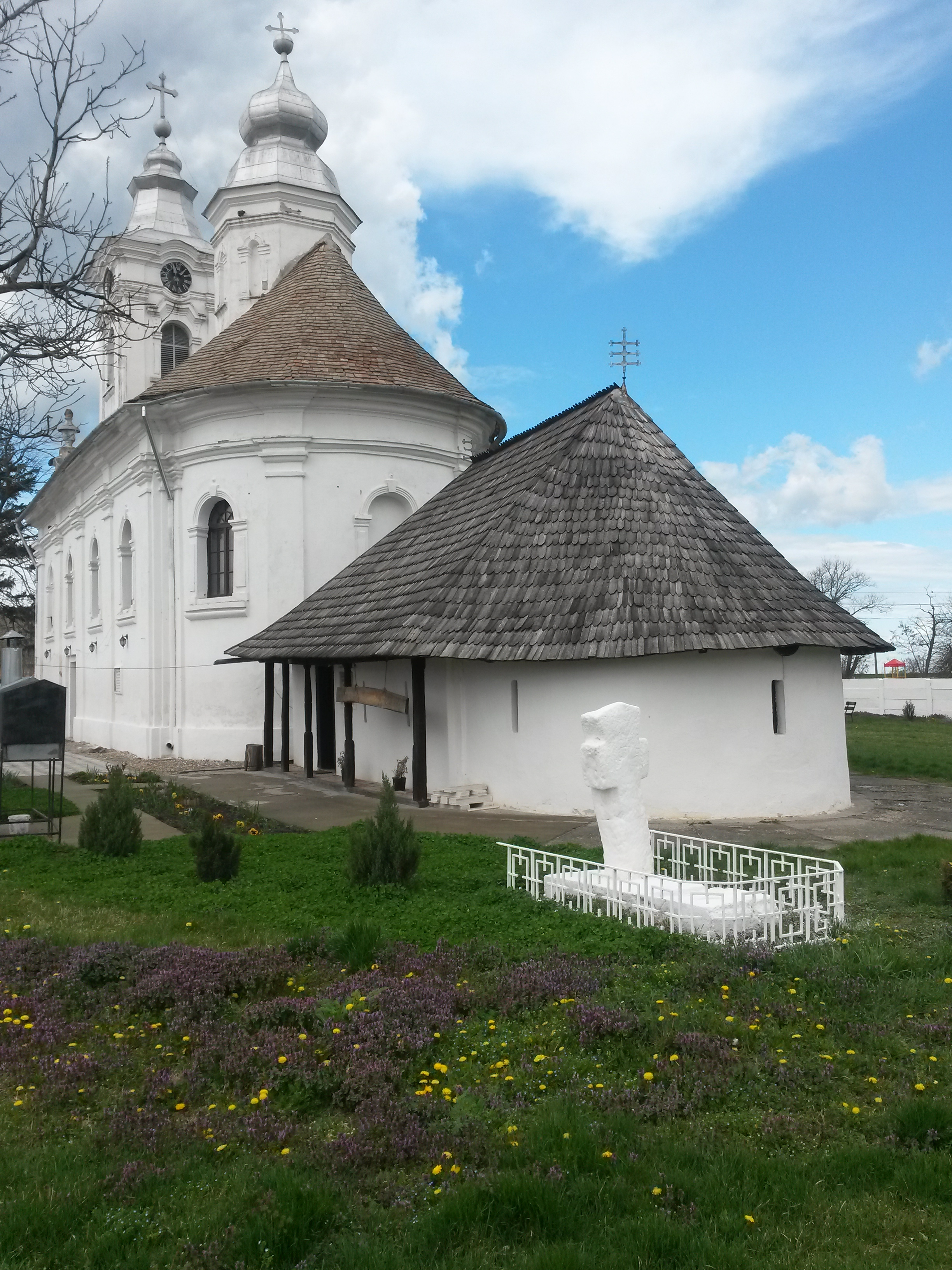 Ansamblu manastire